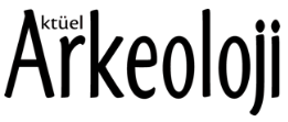 Aktüel Arkeoloji dergisi simgesi